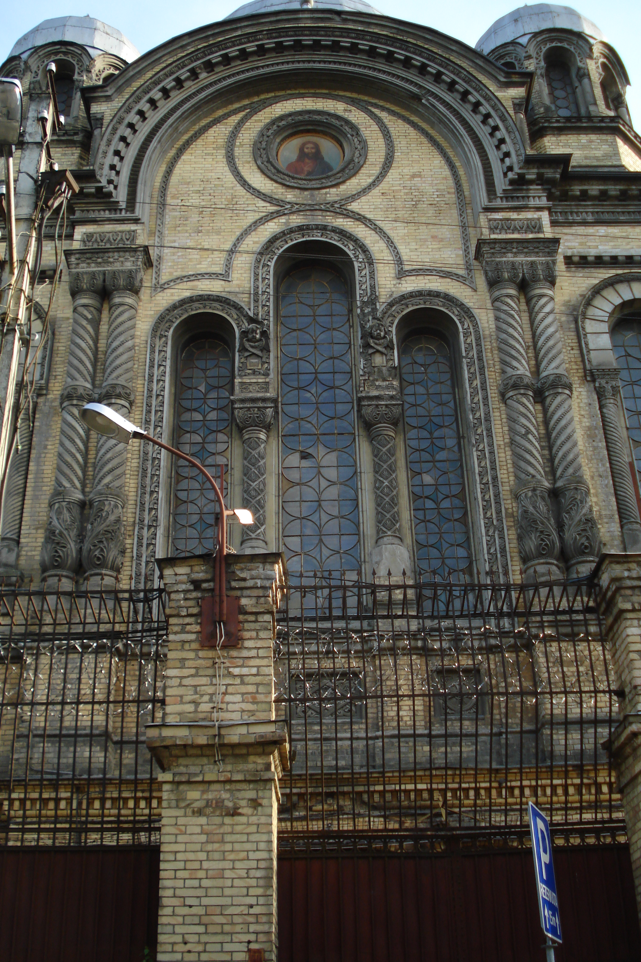 St. Nicholas Orthodox Church in Lukiškės prison. Main facade. Церковь Св. Николая Чудотворца.